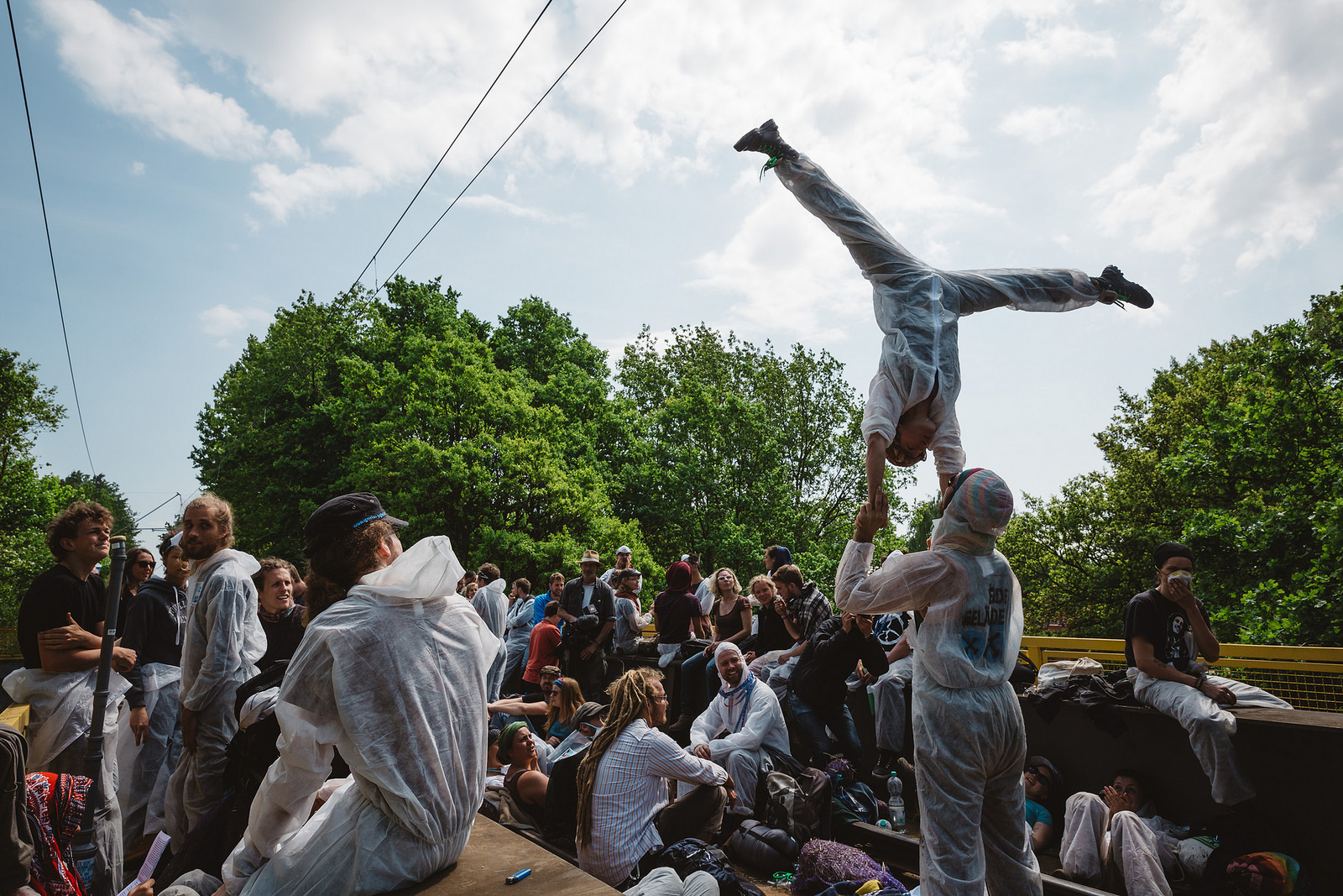 Am 2. Tag, Samstag, besetzten verschiedene Gruppe an mehreren Stellen die Gleise zum Kraftwerk und stoppen den Zugverkehr.